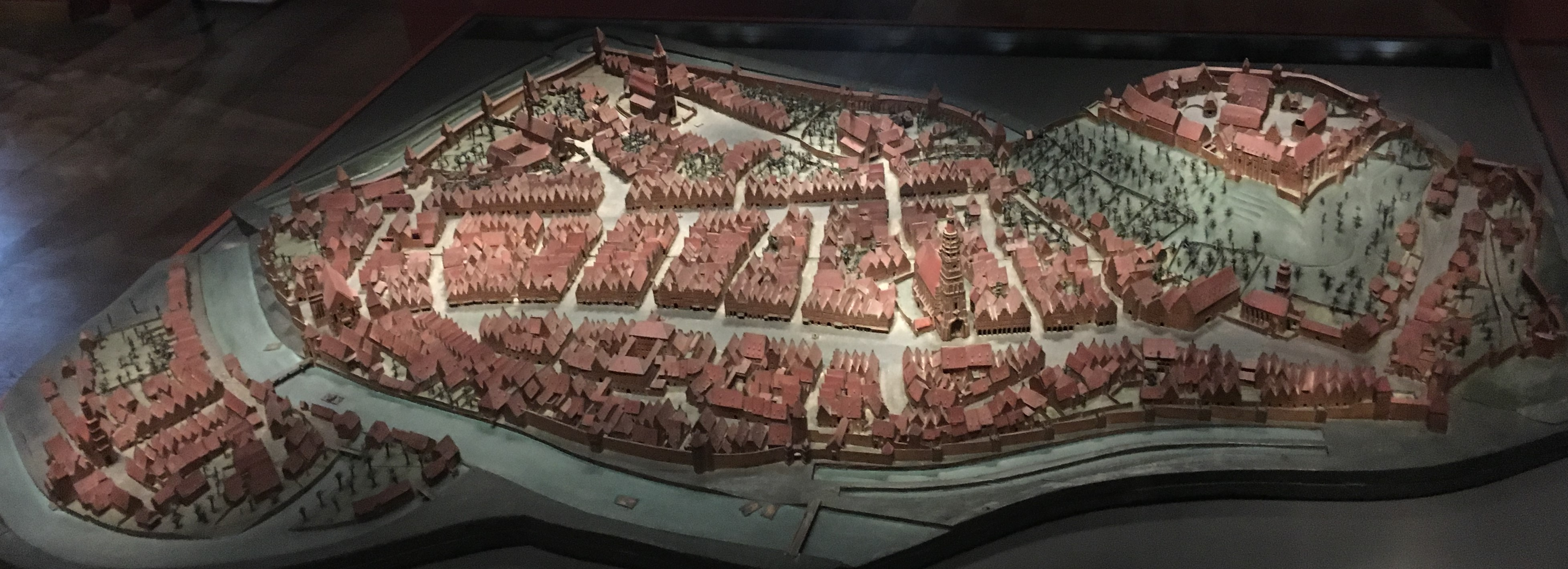 Von Jakob Sandtner 1570 im herzöglichen Auftrag aus Lindenholz hergestellt. Bayrisches Nationalmuseum, Inv. Nr. Mod. 2